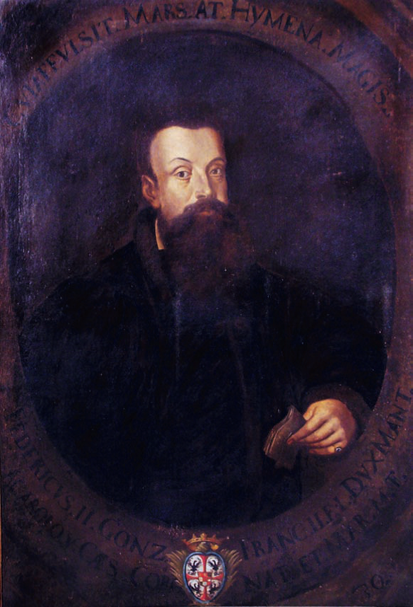 Ritratto Araldico di Federico II Gonzaga